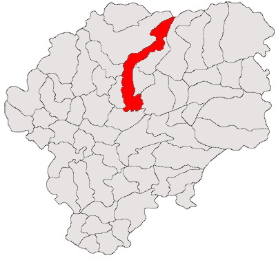 Categorie:Hărţi ale judeţului Bistriţa-Năsăud